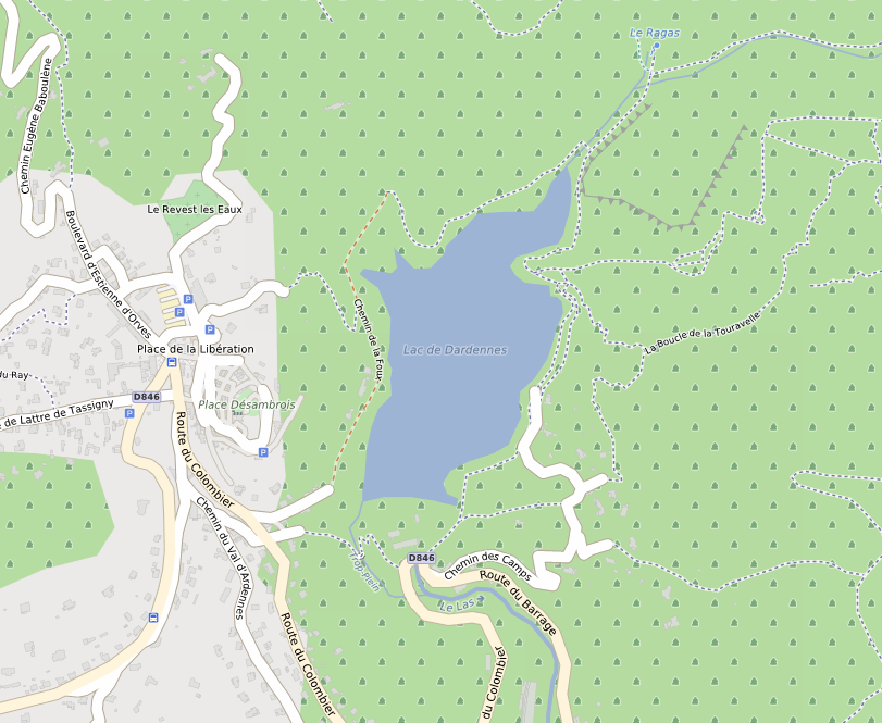 carte réalisée sur umap This map may be incomplete, and may contain errors. Don't rely solely on it for navigation.